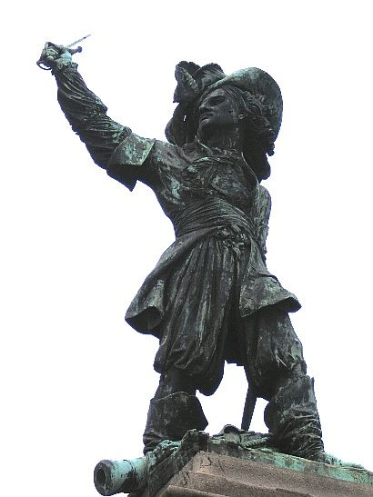 Standbeeld van Jan Baert te Duinkerke, Frankrijk - Statue de Jean Bart, corsaire français, à Dunkerque, France - Œuvre de Pierre-Jean David d'Angers (1798-1882), inaugurée en 1847.